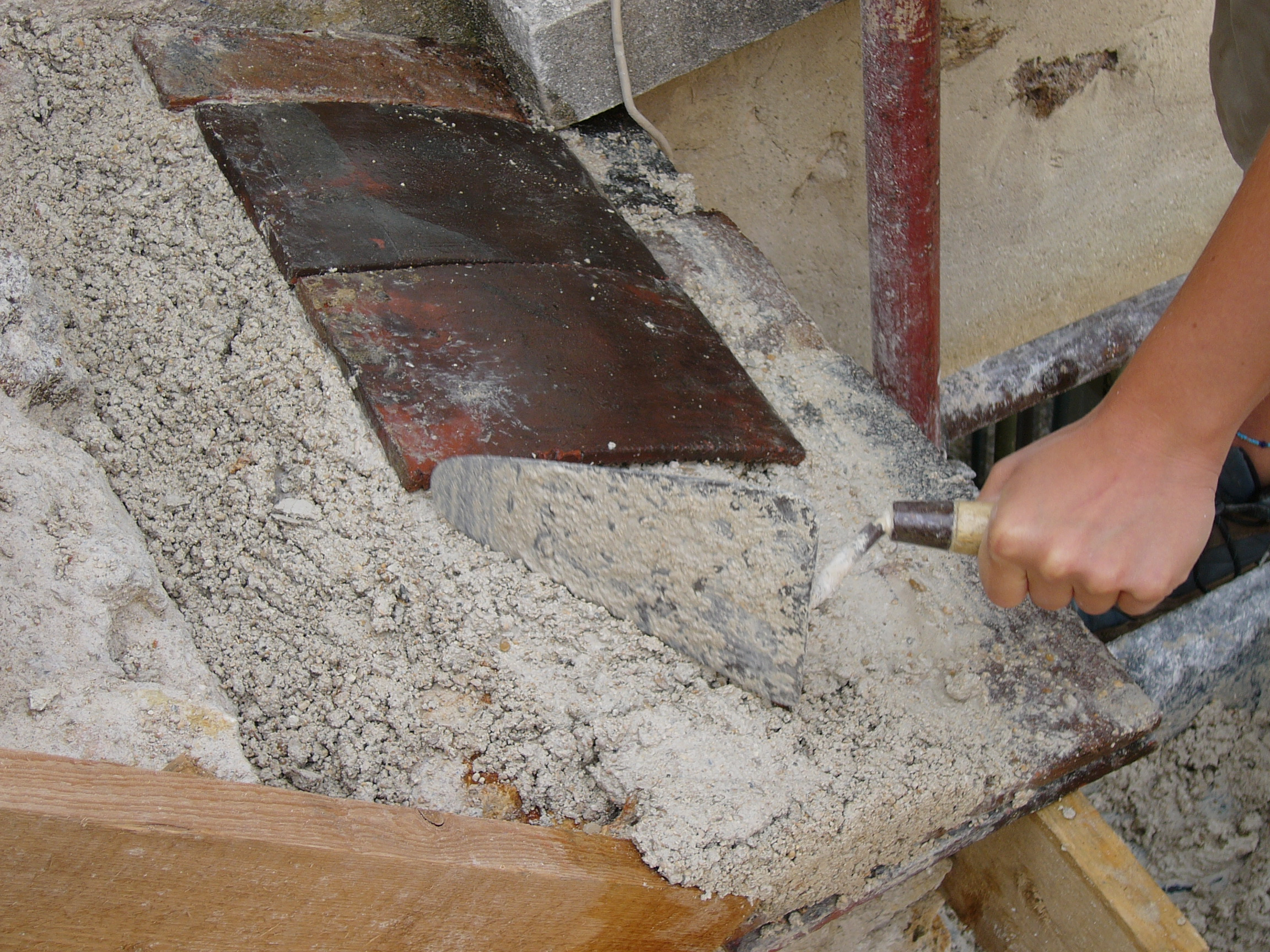 Maçon maniant le mortier à l'aide d'une truelle. Photo So Leblanc